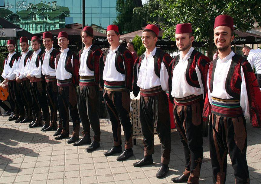 Sandžačka narodna nošnja - Folklorni ansambl "Rožaje"